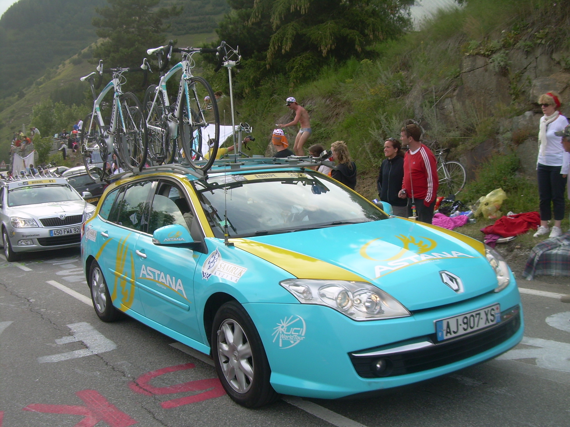 El coche del equipo ciclista Astana en la 19ª etapa del Tour de Francia 2011, en la subida a Alpe d'Huez